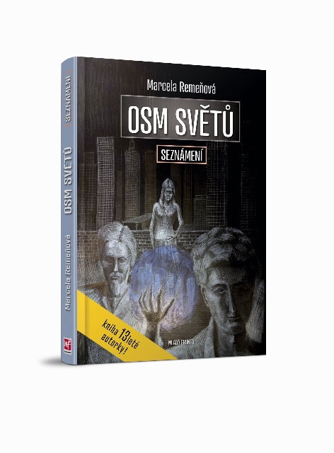 Obálka knihy Osm světů